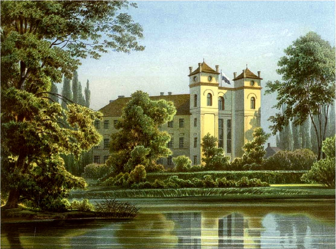 Schloss Lübbenau, Kreis Calau, Provinz Brandenburg